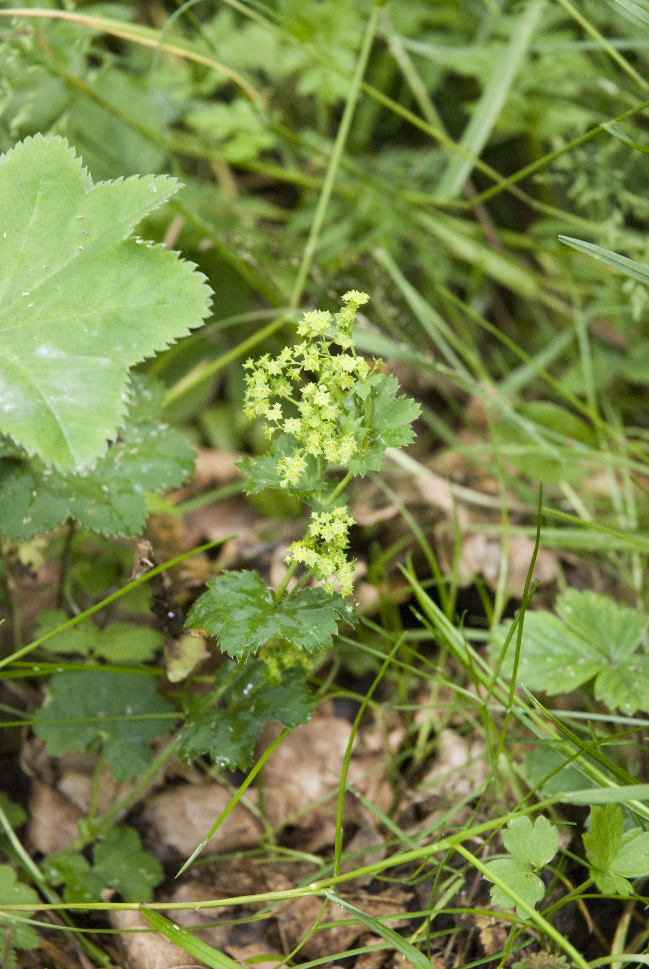 Alchemilla xanthochlora - Alchémille vert jaunâtre - forêt de Saint-Michel (Aisne) le 27/05/2007